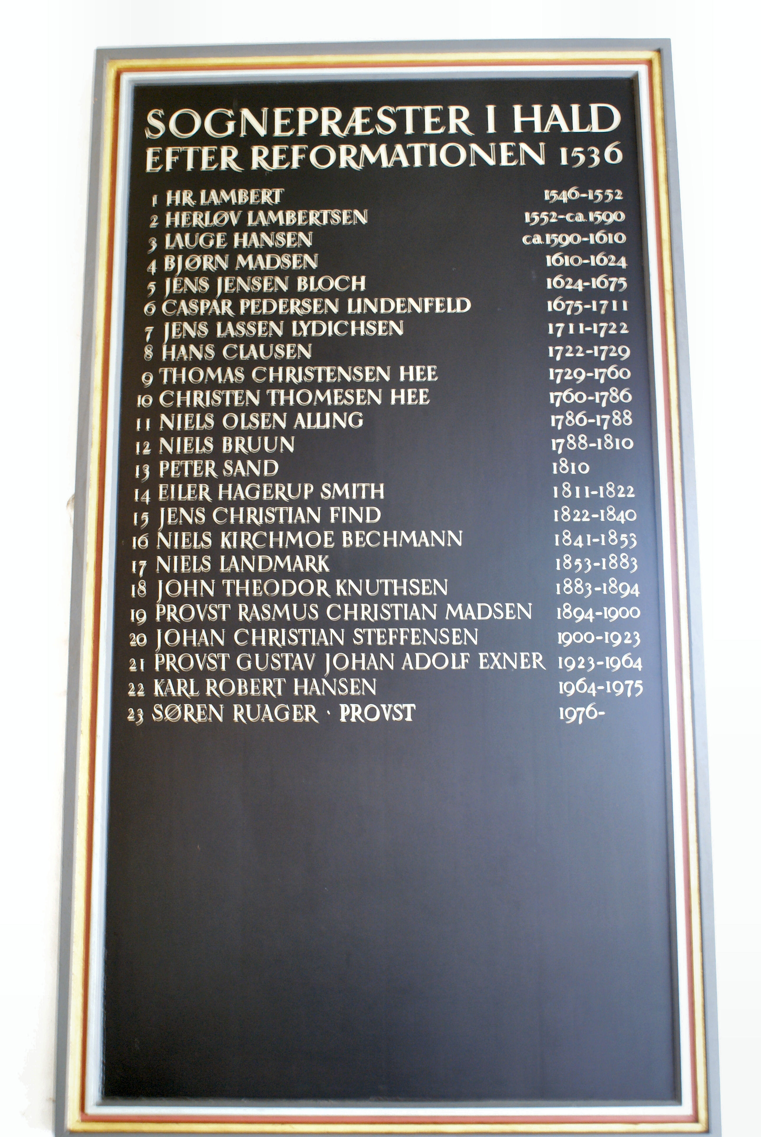 Hald Kirke, præstetavle (Series pastorum)